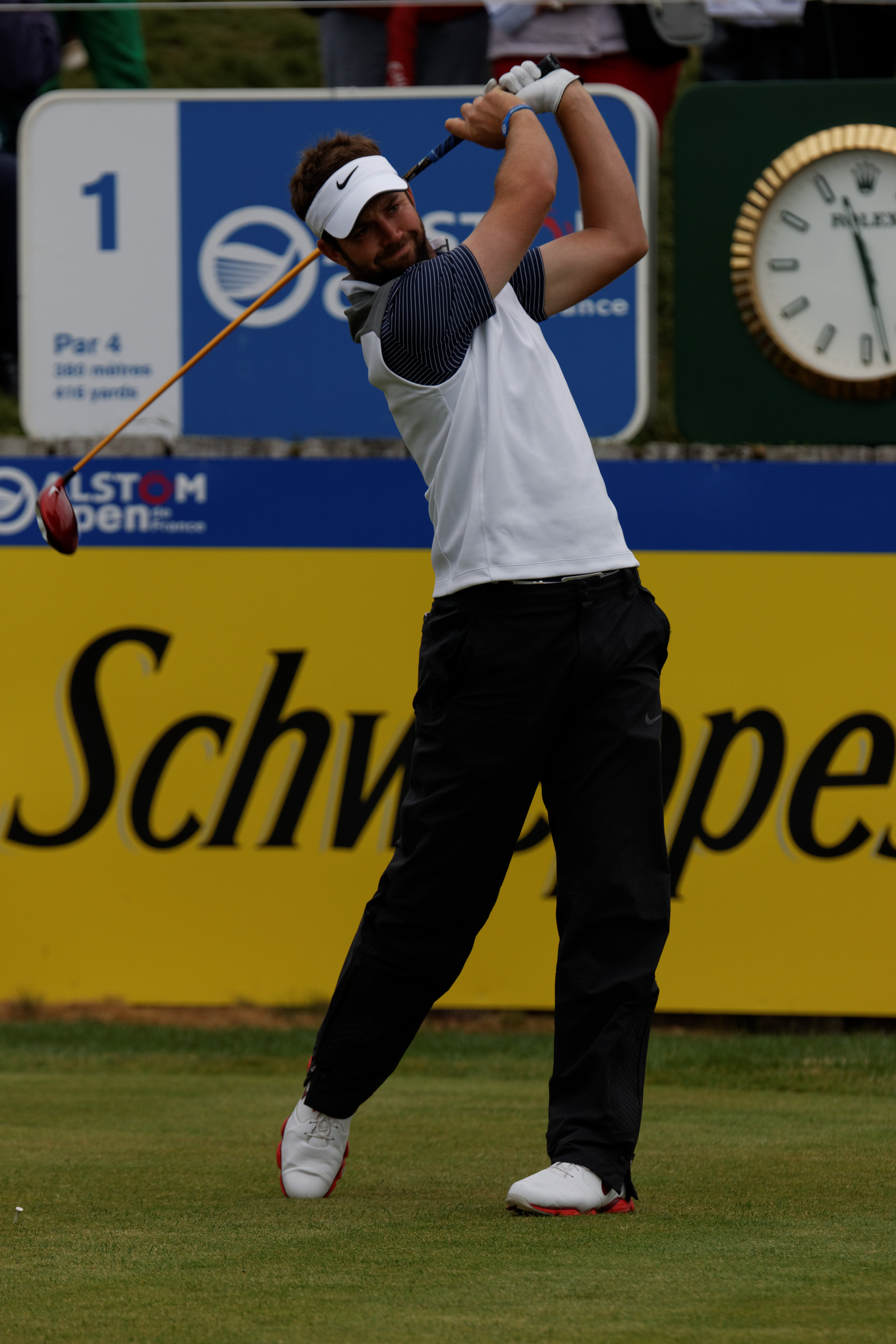 Scott Jamieson lors du quatrième tour de l'Open de France 2014 - Golf National - Saint-Quentin-en-Yvelines (78) - départ du trou n° 1